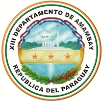 Escudo del Departamento de Amambay, Paraguay